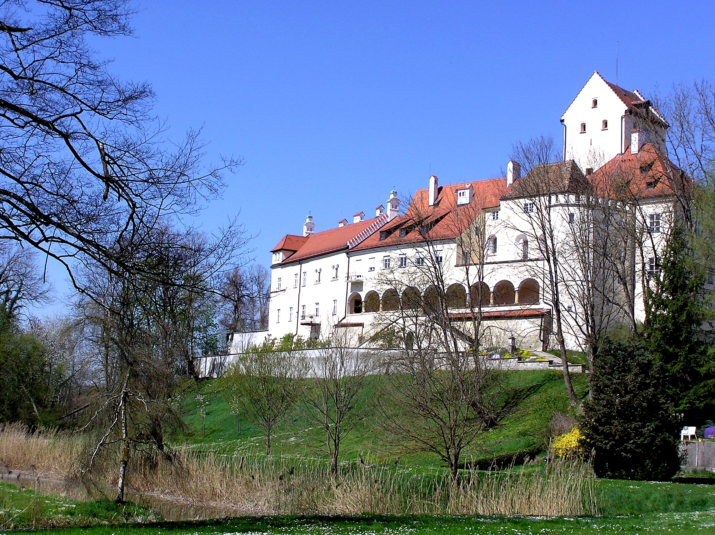 Schloss Seefeld vom Schlossgarten aus gesehen.